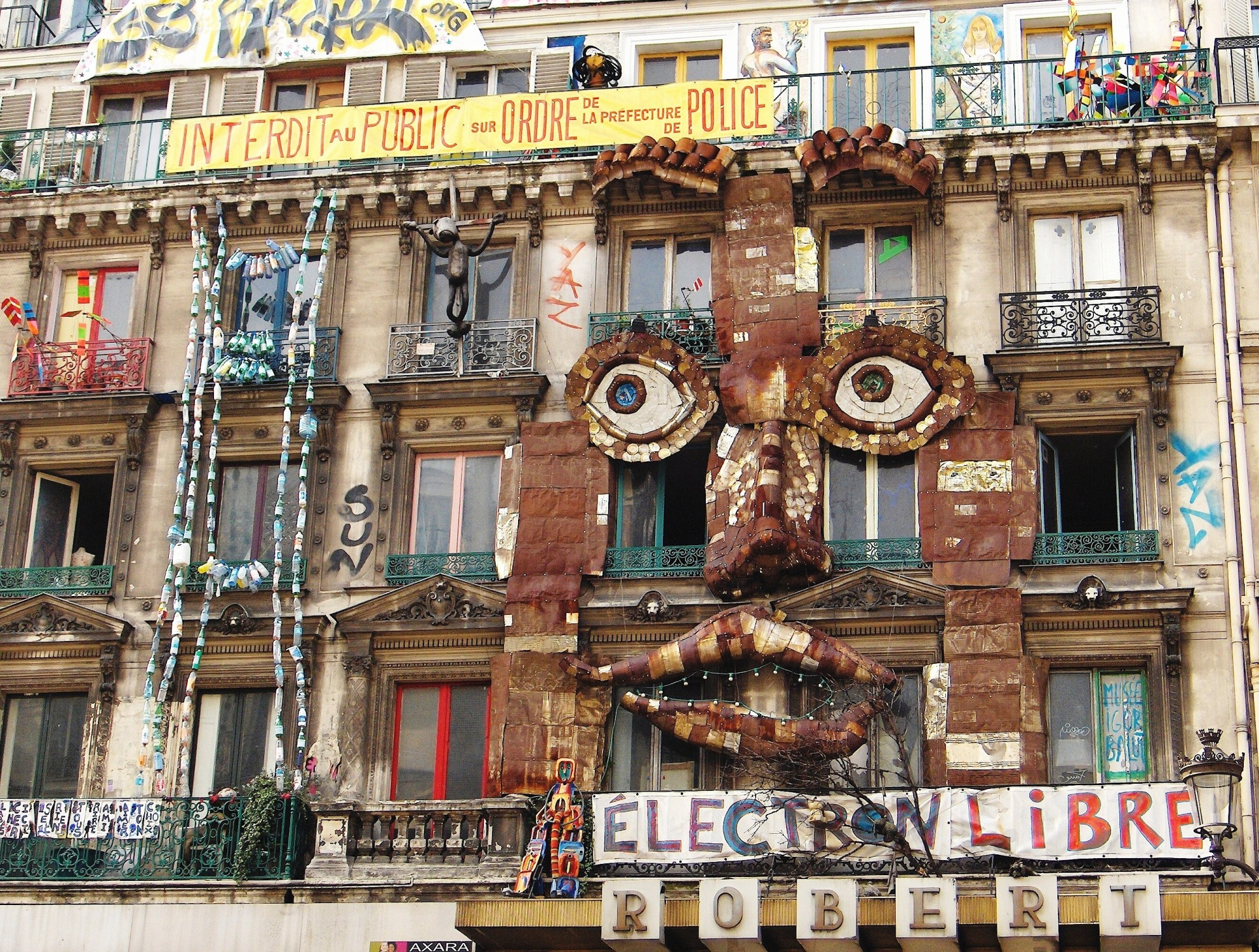 Paris (France) : Squat au 59 rue de Rivoli (1er arrondissement)